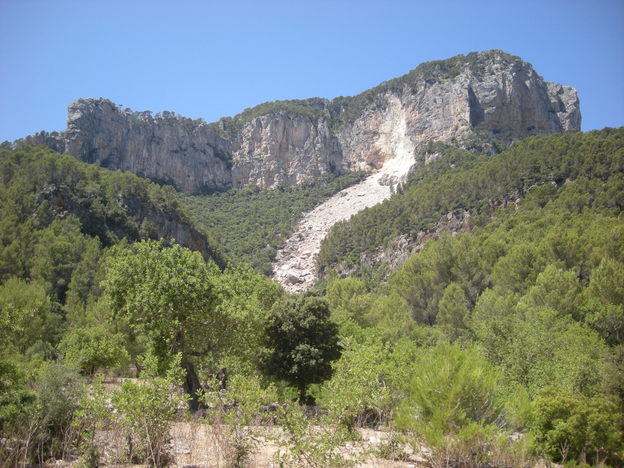 Desprendiment al Puig d'Alcadena. Foto des de la possessió de Son Cocó.